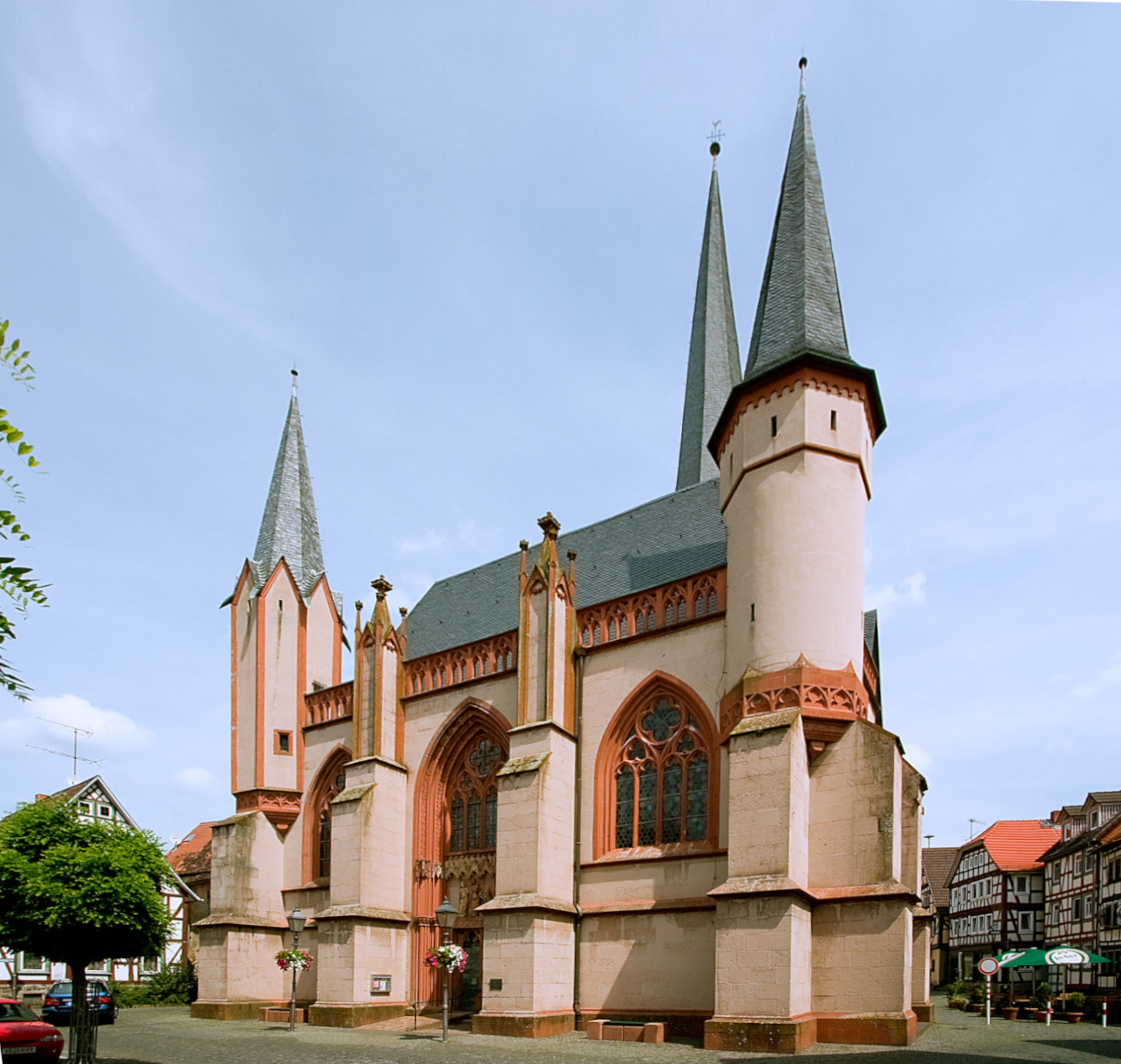 Die Liebfrauenkirche in Schotten im Vogelsbergkreis. Die gotische Hallenkirche wurde zwischen 1300 und 1400 erbaut.